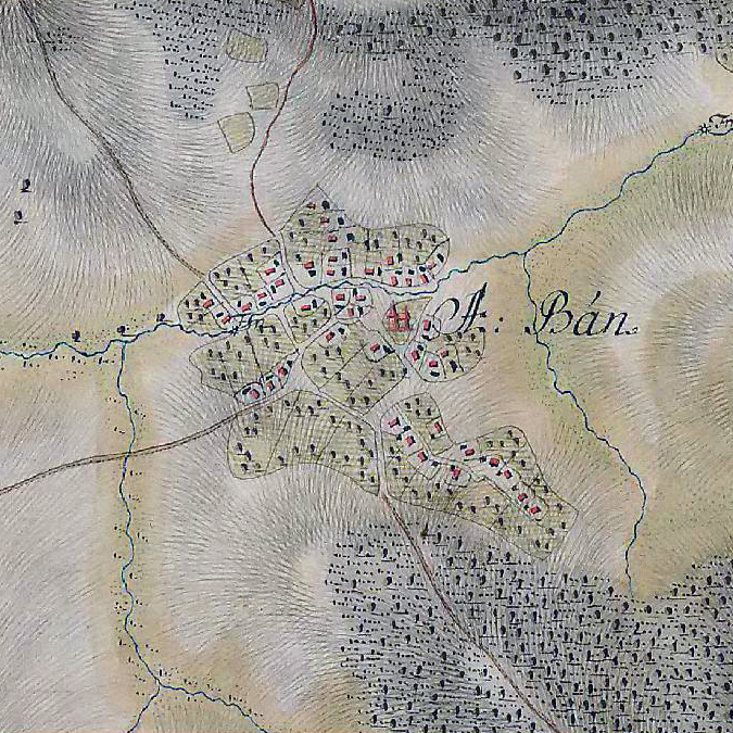 Harta Iosefină a Transilvaniei, 1769-1773, fragment: satul Bănișor în Sălaj.